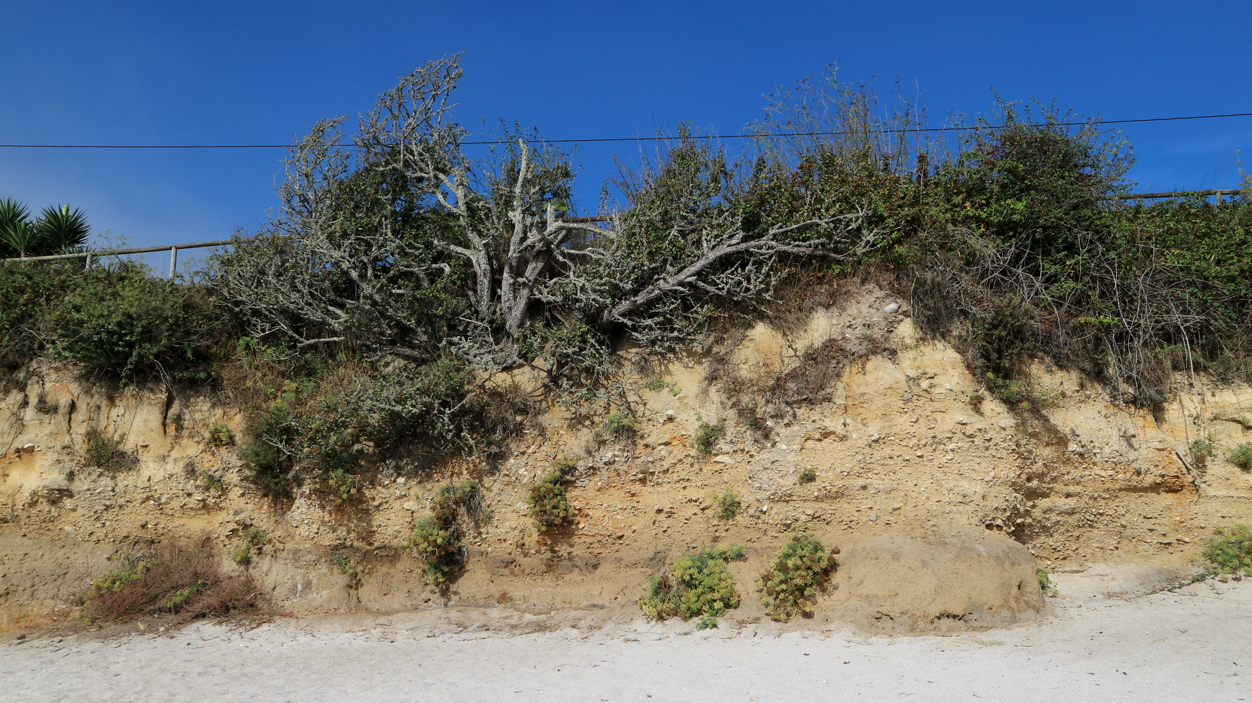 Xacemento arqueolóxicos dunha salgadeira romana (S. I-IV) na praia de Canexol. A Illa de Ons, Ons, Bueu - Parque Nacional das Illas Atlánticas de Galicia.